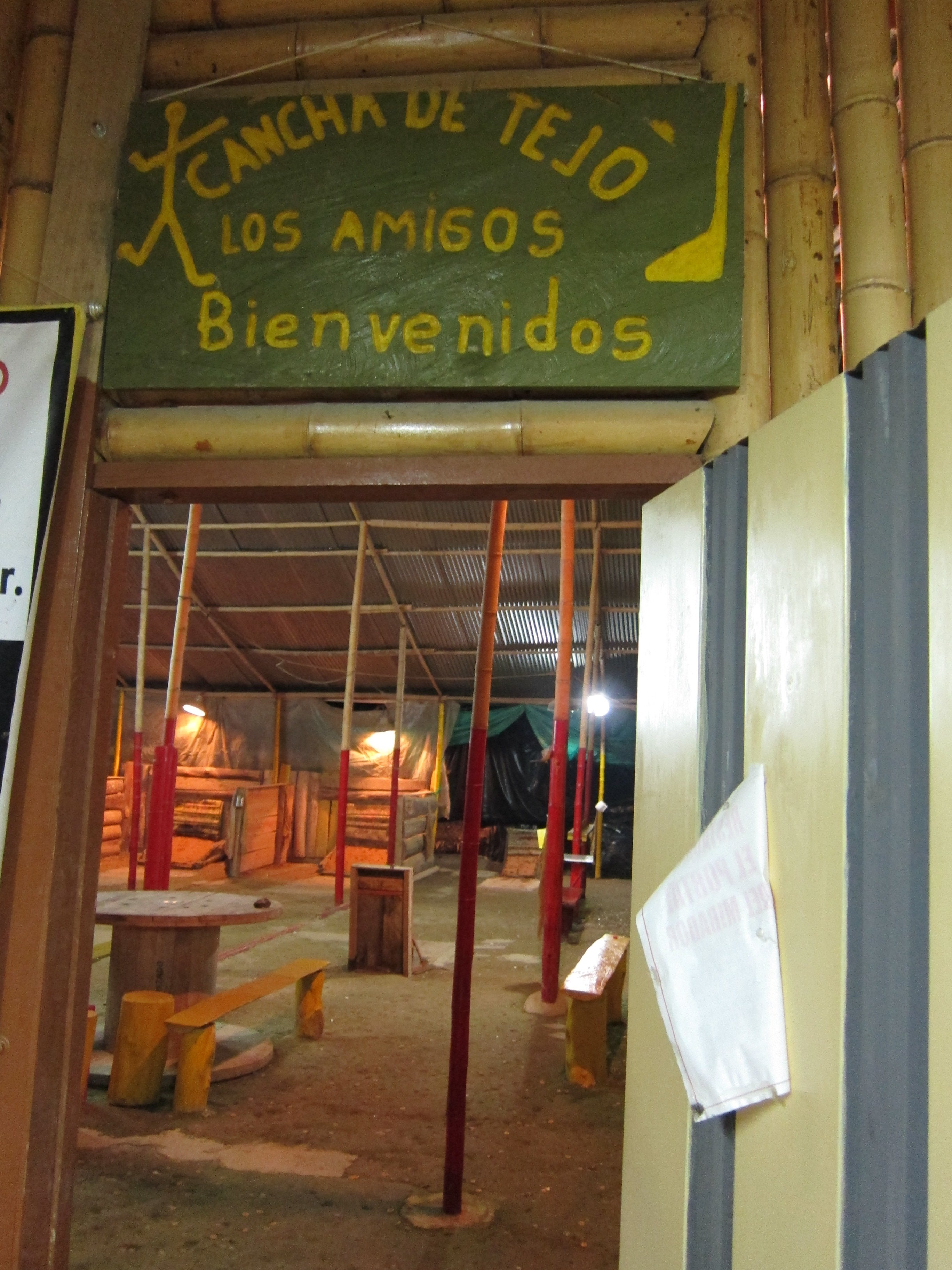 Salento, Colombia